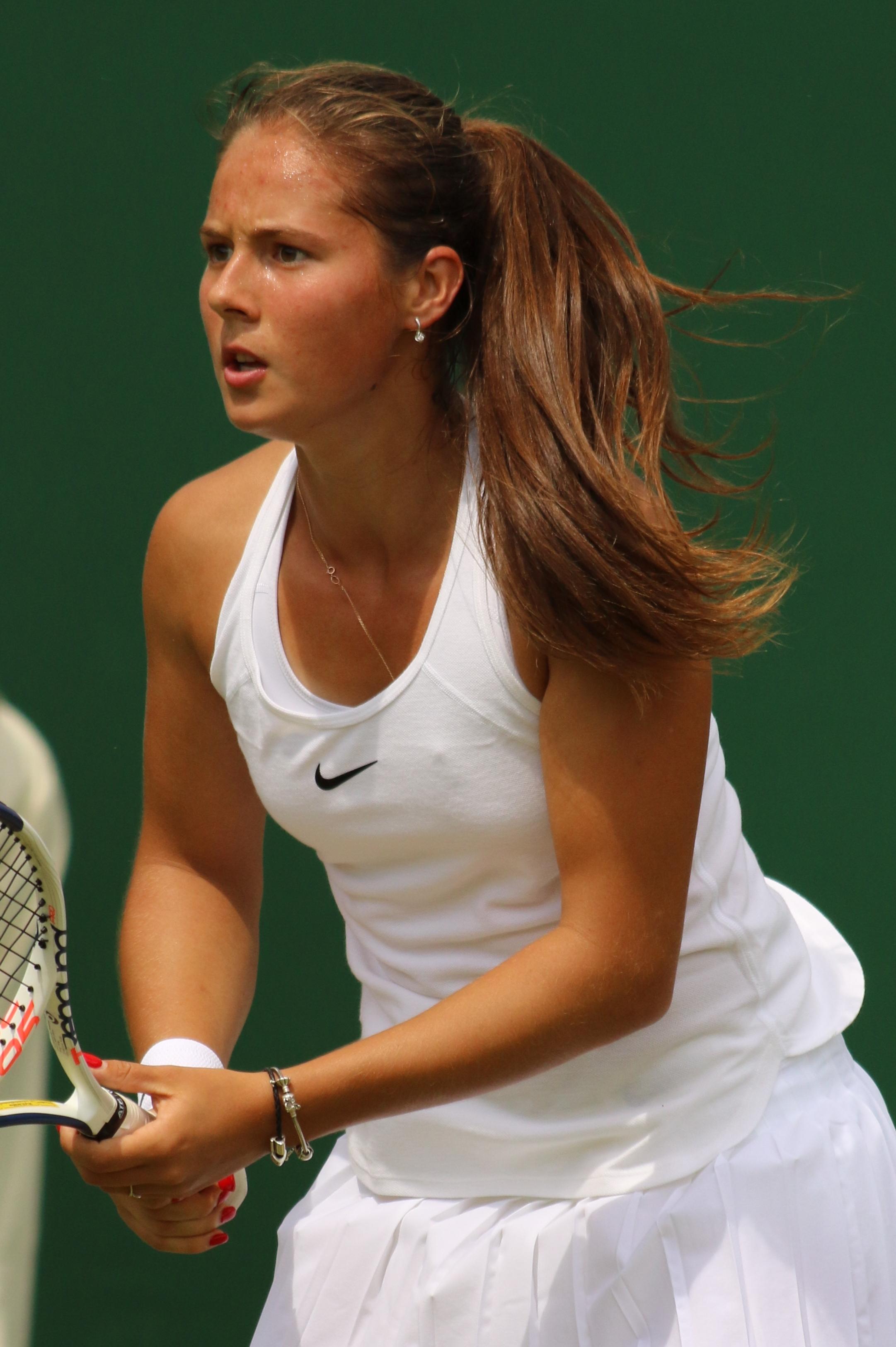 Kasatkina WM16 (27)